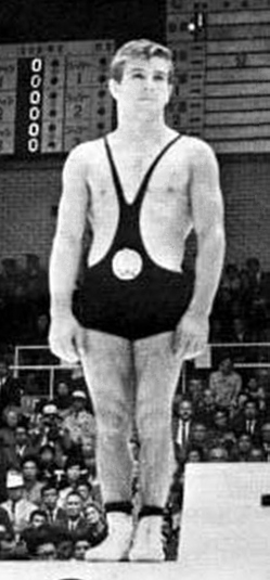 Angel Kerezov, 1964 Olympics